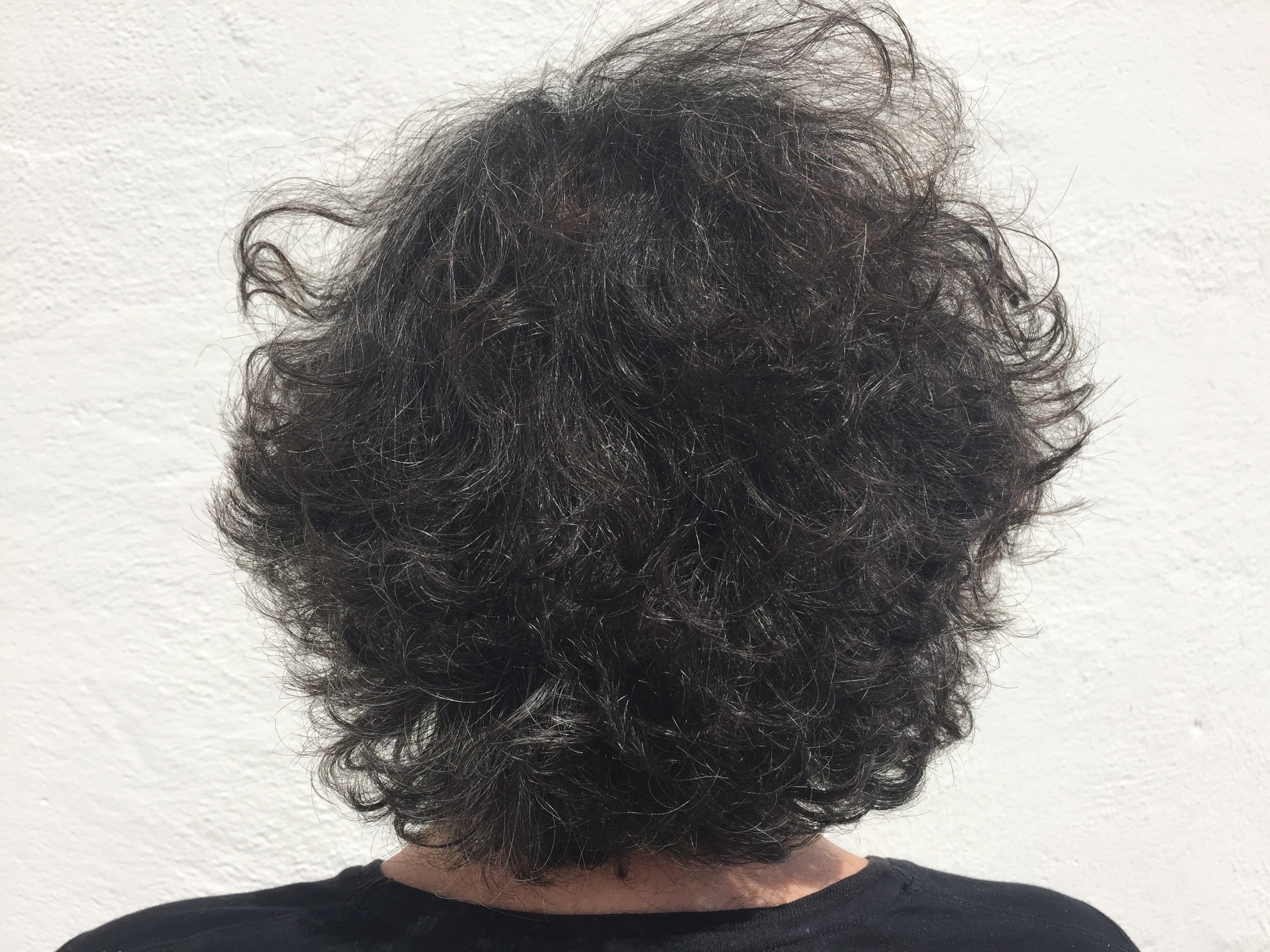 Bilde fra selskapets hjemmeside